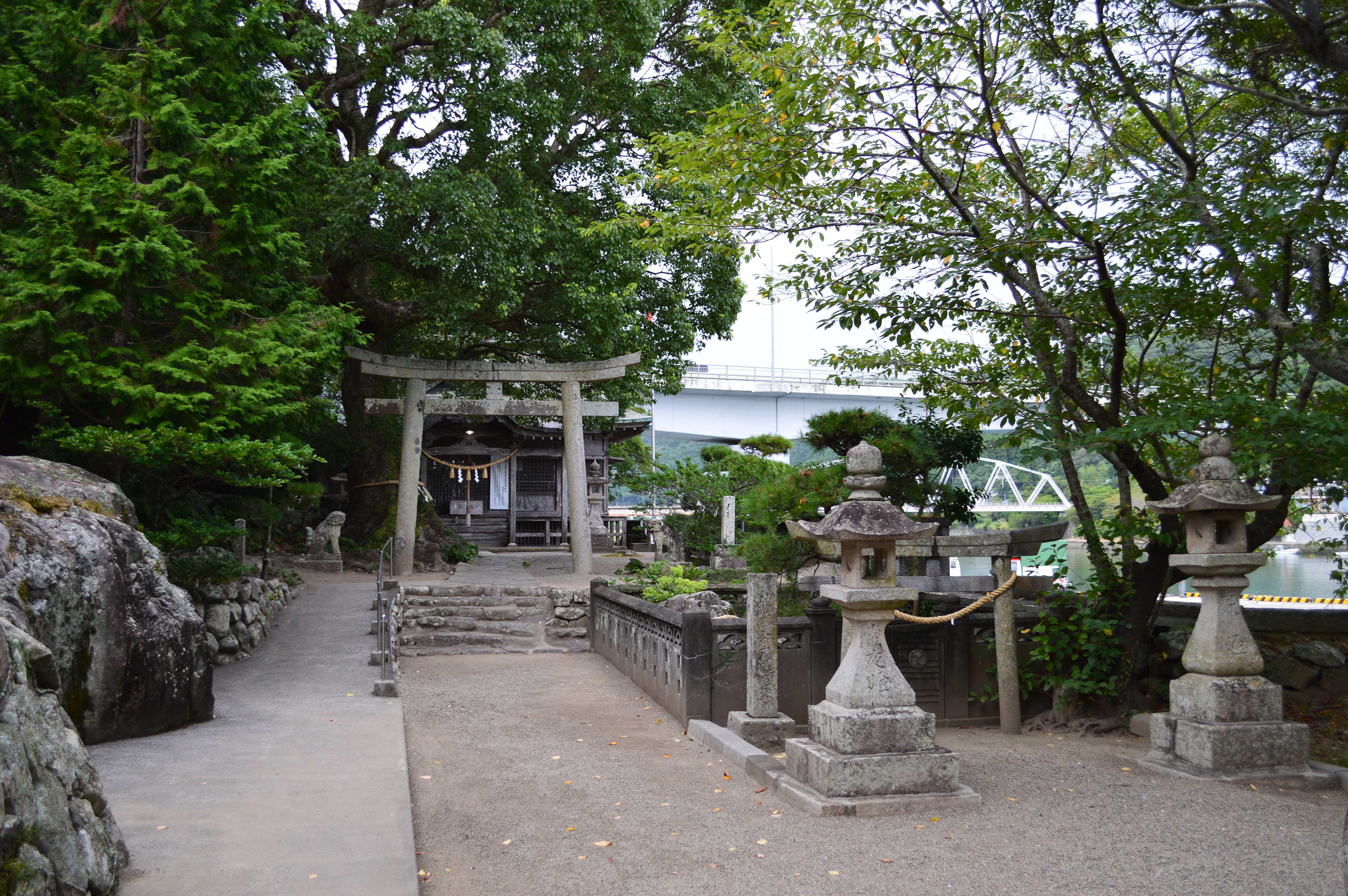 立磐神社 境内